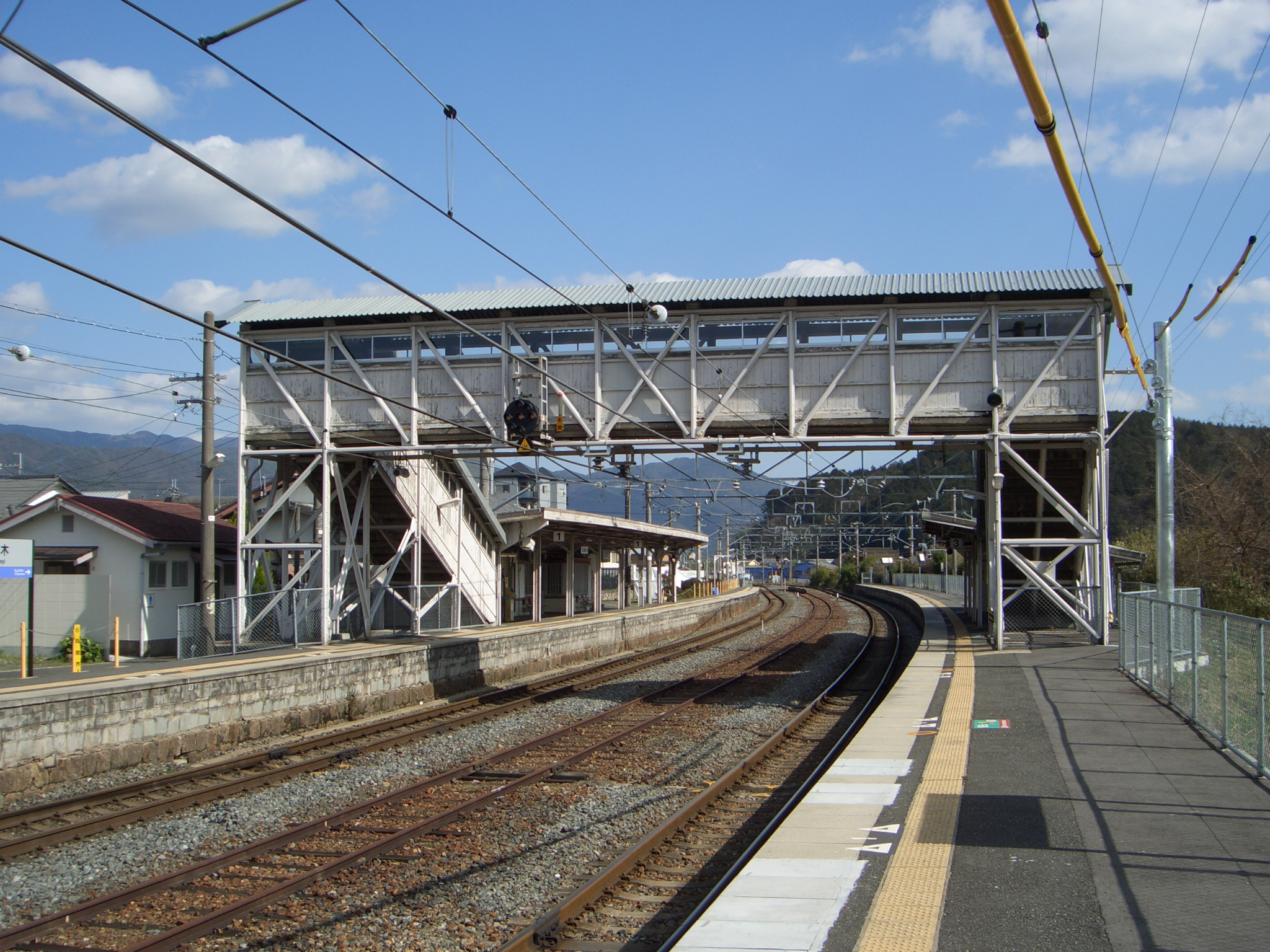 西日本旅客鉄道山陰本線八木駅構内。 幡生方面のりば北端より東南東を望む。 京都府南丹市。